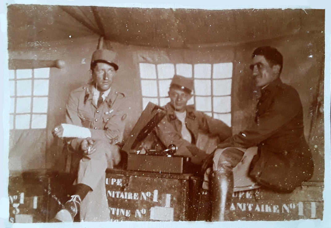 Albert Chemin (à droite) et des officiers du Groupe sanitaire N°1 pendant la Campagne du Maroc, 22 janvier 1932, Aghembou